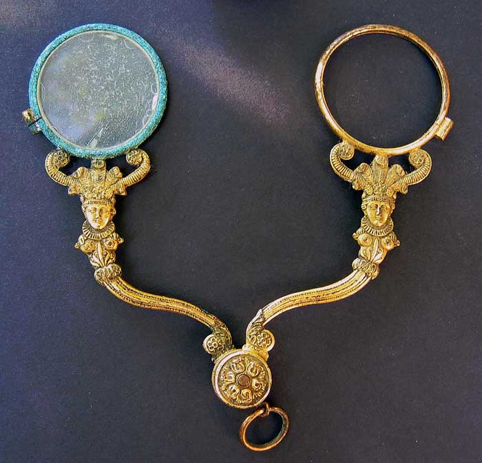 1300 Vom König Augustus dem 3.